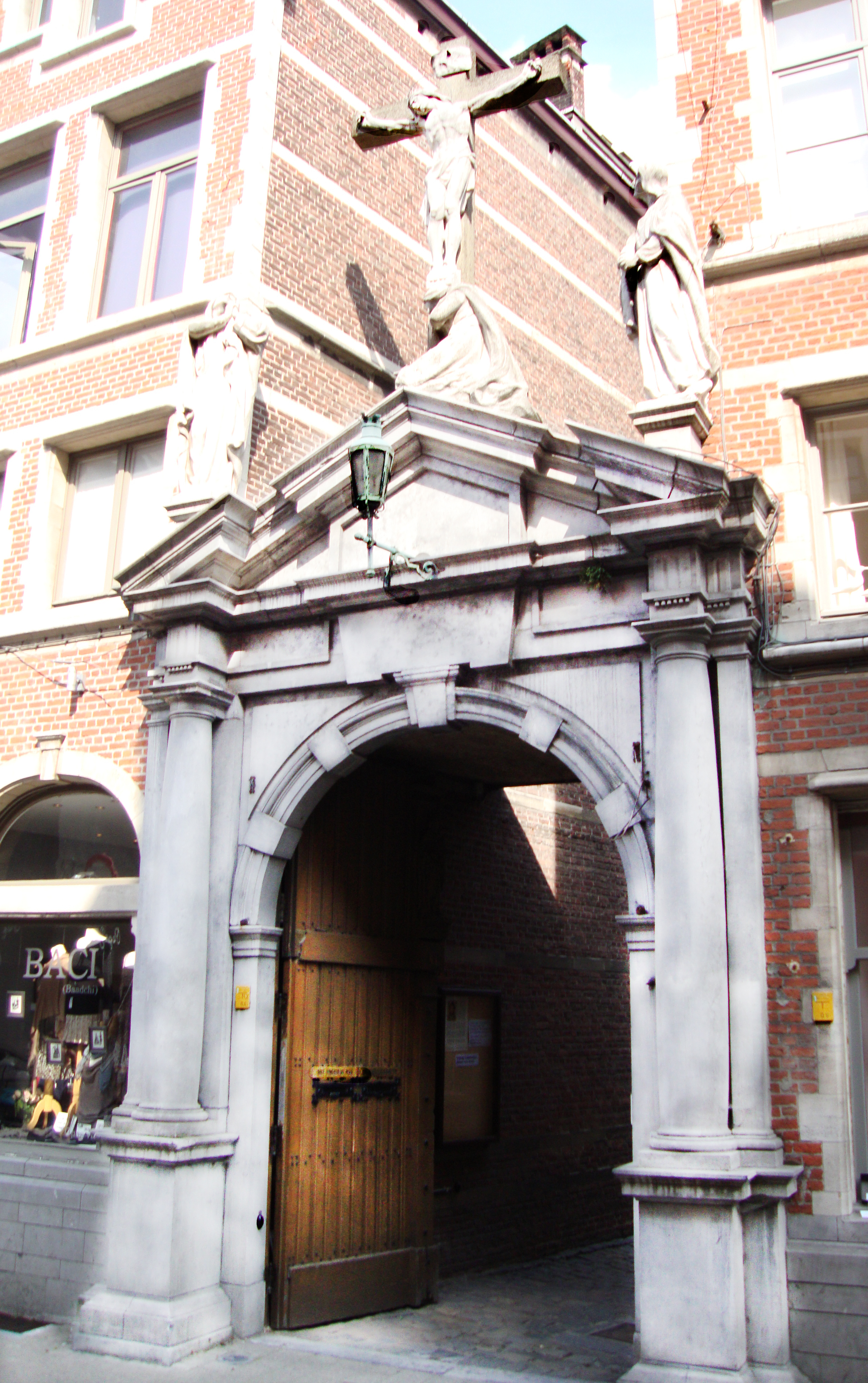 Voormalig klooster van de witzusters in Antwerpen. Nu in gebruik als bejaardenzorgcentrum Simeon en Hanna, bezinningscentrum, kapel en vergadercentrum van Sant' Egidio. Sint Egidiusgemeenschap in Antwerpen.